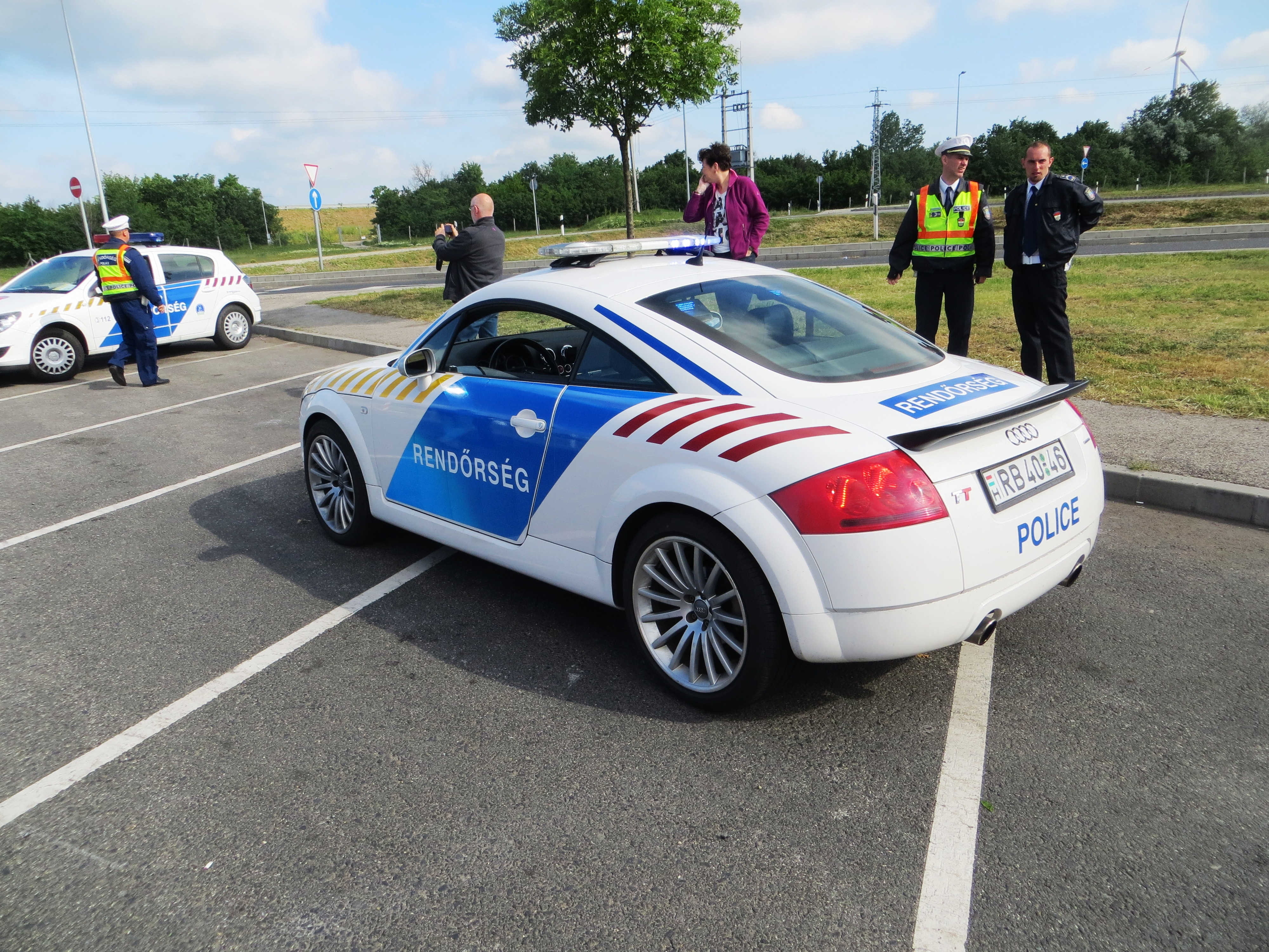 Hongaarse politie auto